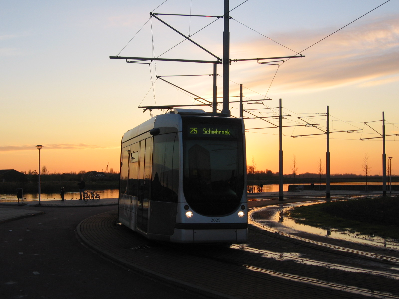 Citadis-tram 2025 bij de keerlus in Carnisselande.